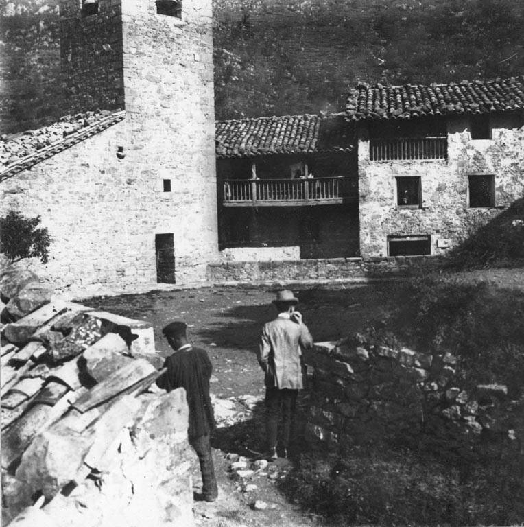 Façana de l'Església de Castell de l'Areny i dos homes. Cèsar August Torras i Ferreri (Entre 1890 i 1923)